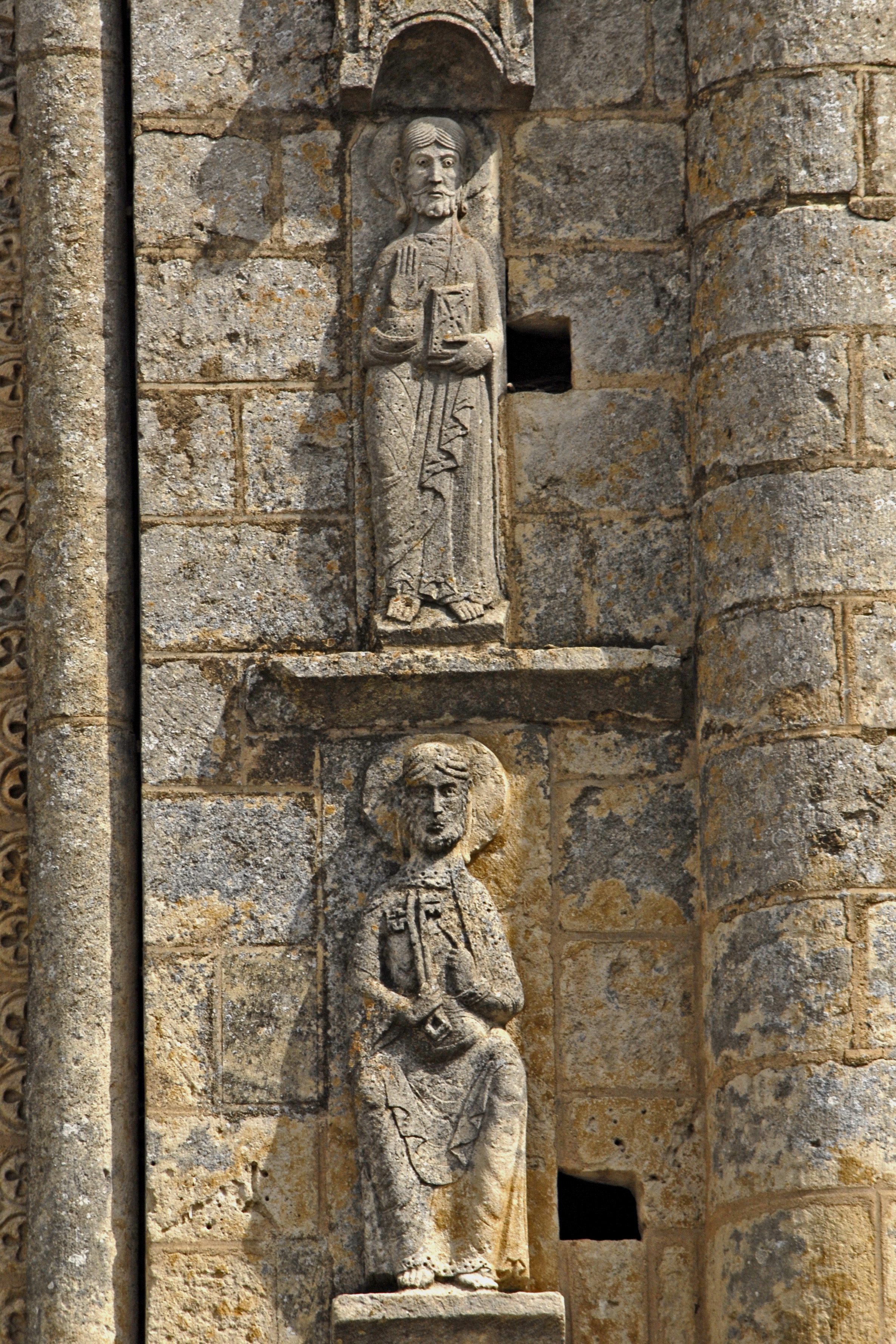 Saint-Jouin-de-Marnes, Die Heiligen Petrus und Paulus flankieren das Mittelfenster